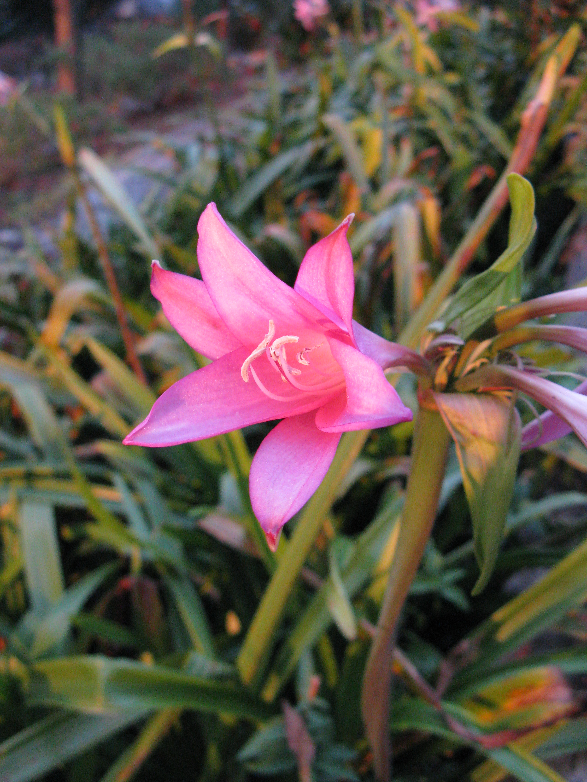 X Amacrinum